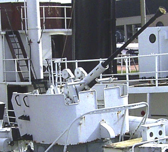 40mm/70 MEL Bofors Flak in offenem Geschützstand auf dem Jaguar-Klasse Schnellboot "Kranich" im Deutschen Schifffahrtsmuseum Bremerhaven.